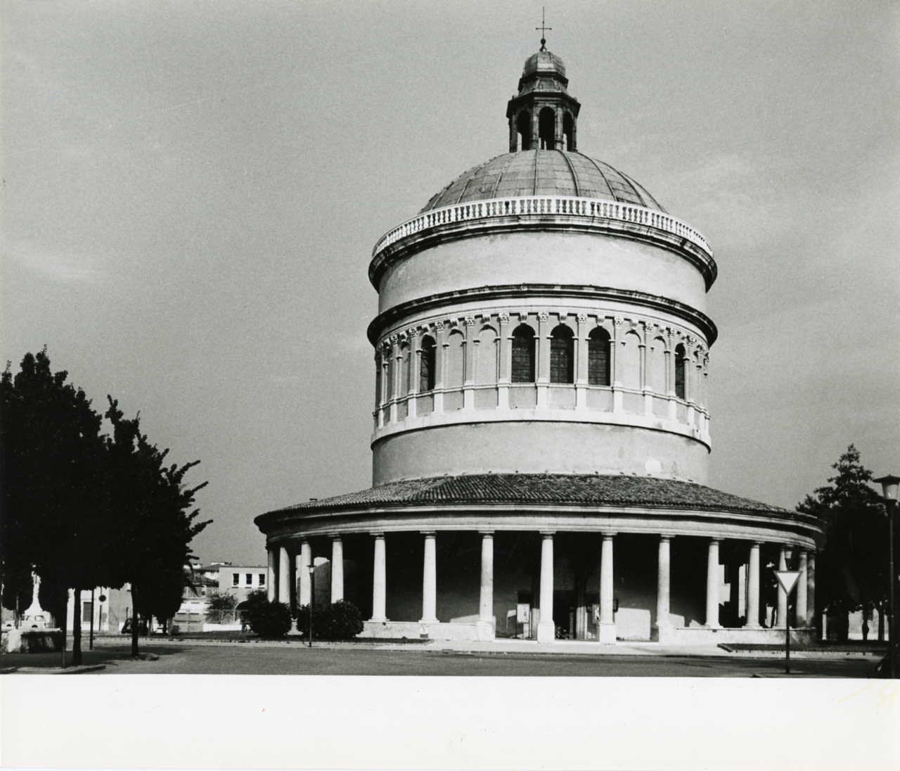 Servizio fotografico : Verona, 1972 / Paolo Monti. - Stampe: 6 : Positivo b/n, gelatina bromuro d'argento/ carta, 24x30. - ((Al verso delle stampe manoscritti i numeri dei negativi corrispondenti (formato 35 mm) con indicazione del fotogramma: 2059. - Sul coperchio della scatola iscrizione didascalica manoscritta a pennarello nero: "Verona". - Occasione: Documentazione per la pubblicazione: Brugnoli Pier Paolo, "Nella bella Verona", Bologna, Cappelli, 1972. - Fonte: Quaderno di Paolo Monti: Leica 1501-3000 Controllo numerazione (1950-1978), presso Archivio Paolo Monti. - Fonte: Monografia di Brugnoli, Pier Paolo: Nella bella Verona, Bologna, Cappelli (1972). - Fonte: Fattura di Paolo Monti: IV. Commesse/ Fattura/ Fotografie per illustrazione del volume Verona (1972/12/20), presso Archivio Paolo Monti. N. 292 riprese fotografiche della città di Verona in formato 24x30